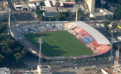 taken by he:משתמש:אסף